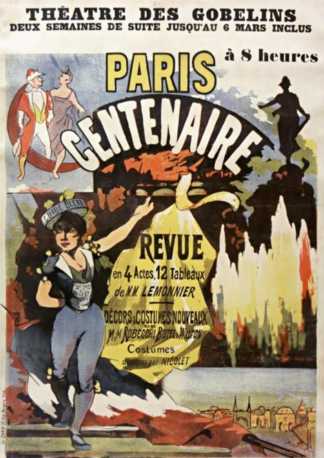 Théâtre des Gobelins... Paris centenaire revue... de MM. Lemonnier. : affiche